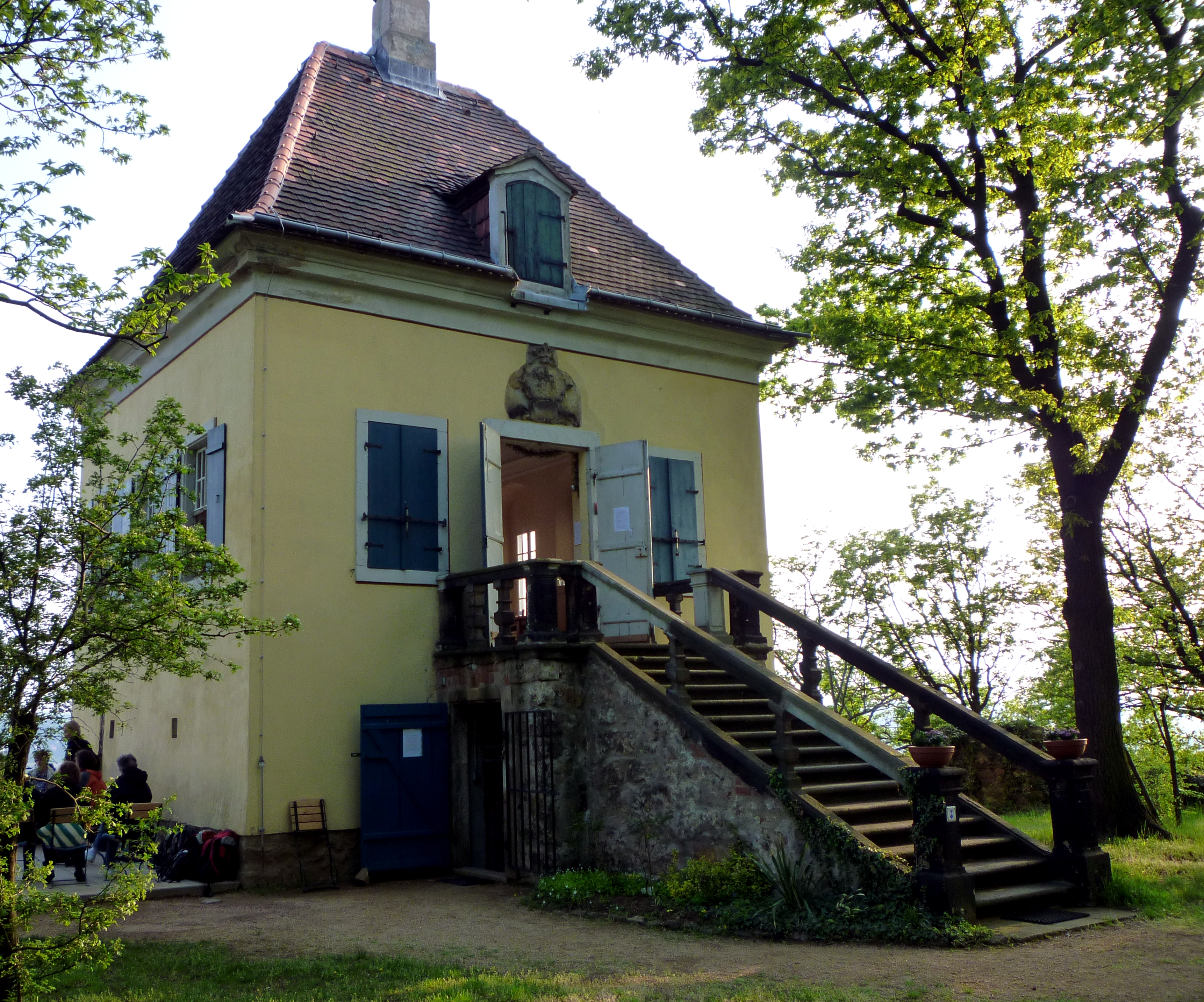 Weinbergshaus des Minckwitzschen Weinbergs in Radebeul